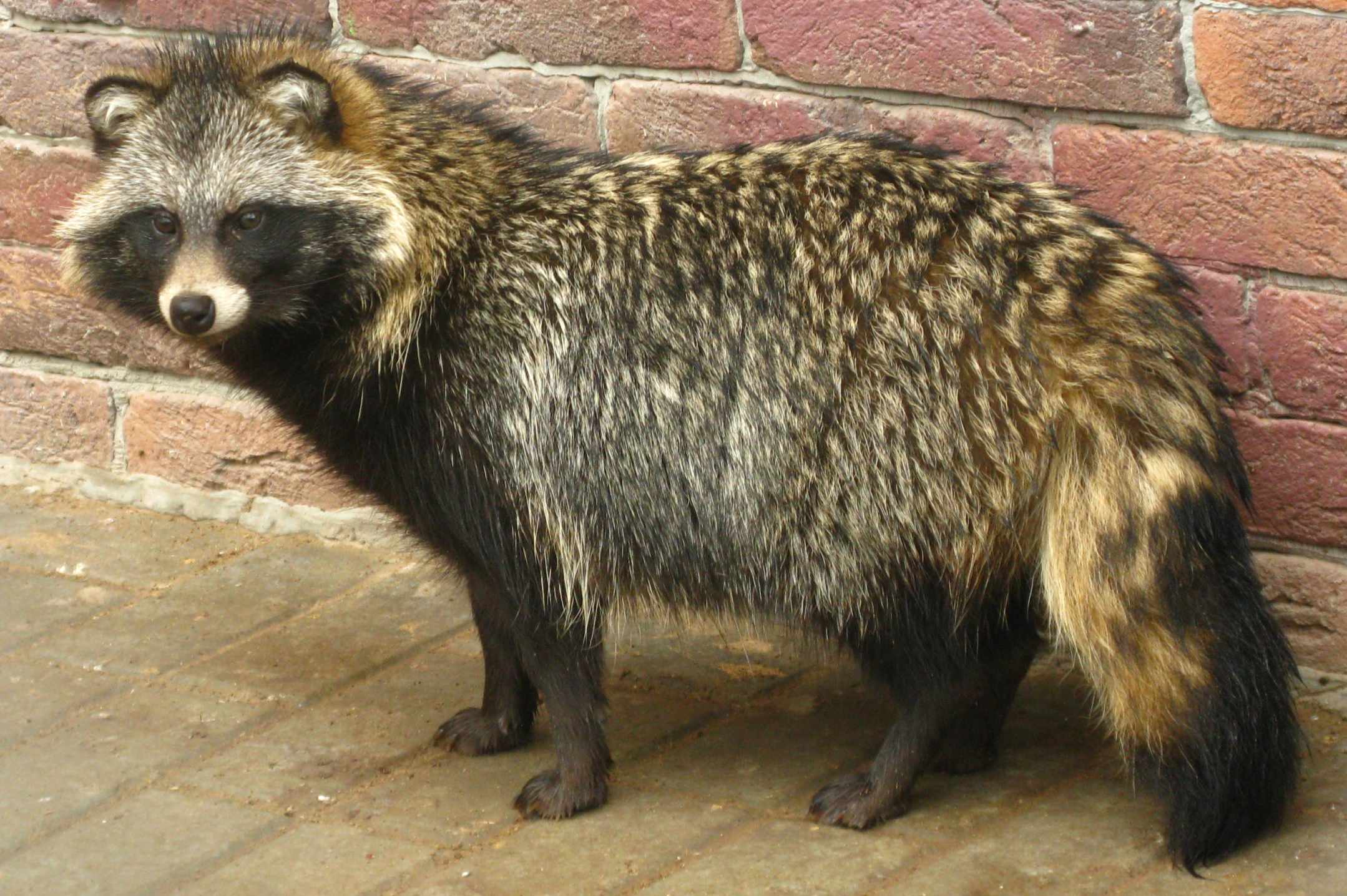 Енотовидная собака (Nyctereutes procyonoides) в зоопарке города Гродно, Беларусь.